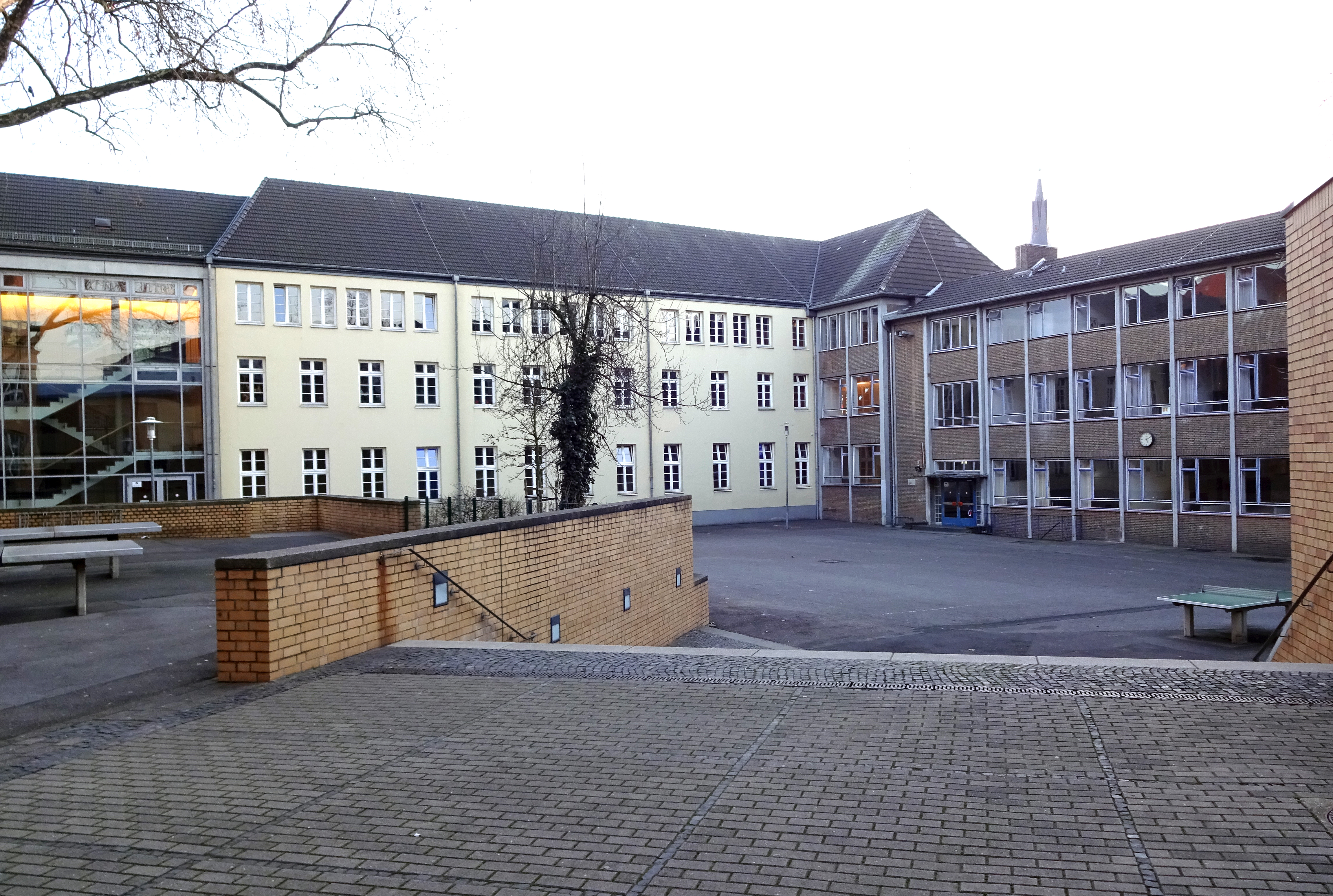 Ritterstraße Schulhof St.-Ursula-Gymnasium mit Nr. 14 ehemaliger Klostertrakt der Ursulinen (Kernsanierung des Klostertraktes 1998/99 ) und Ursulinengasse Nr. 2